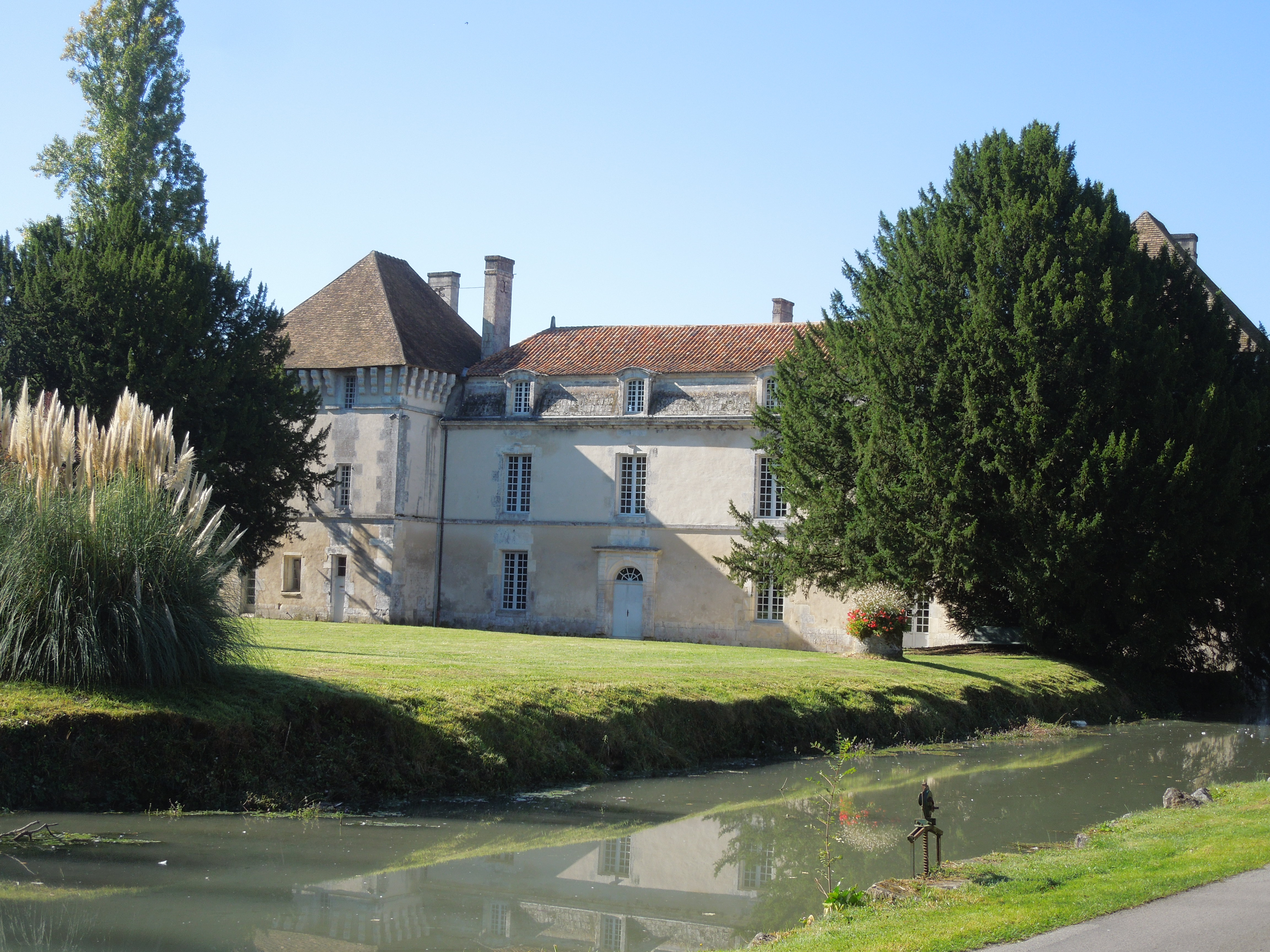 Das Château de Lignières in Lignières-Sonneville, Parkseite mit Wassergraben, gesehen von von Nordosten